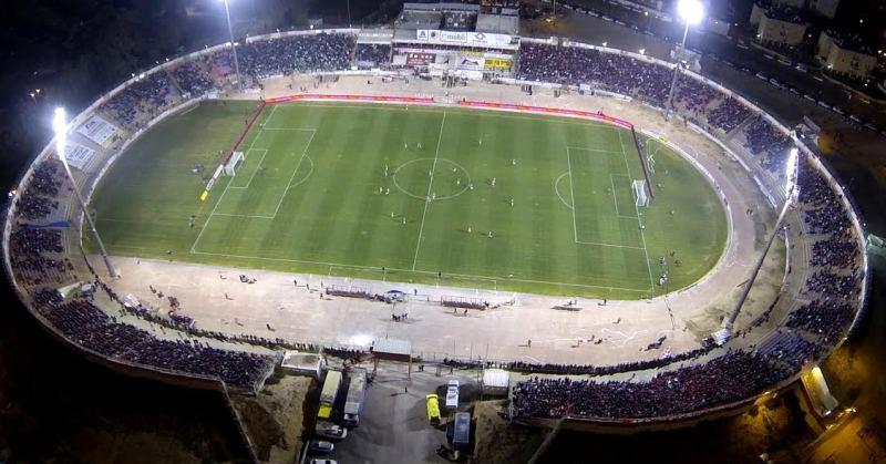 הפועל באר שבע - מכבי חיפה 1-3